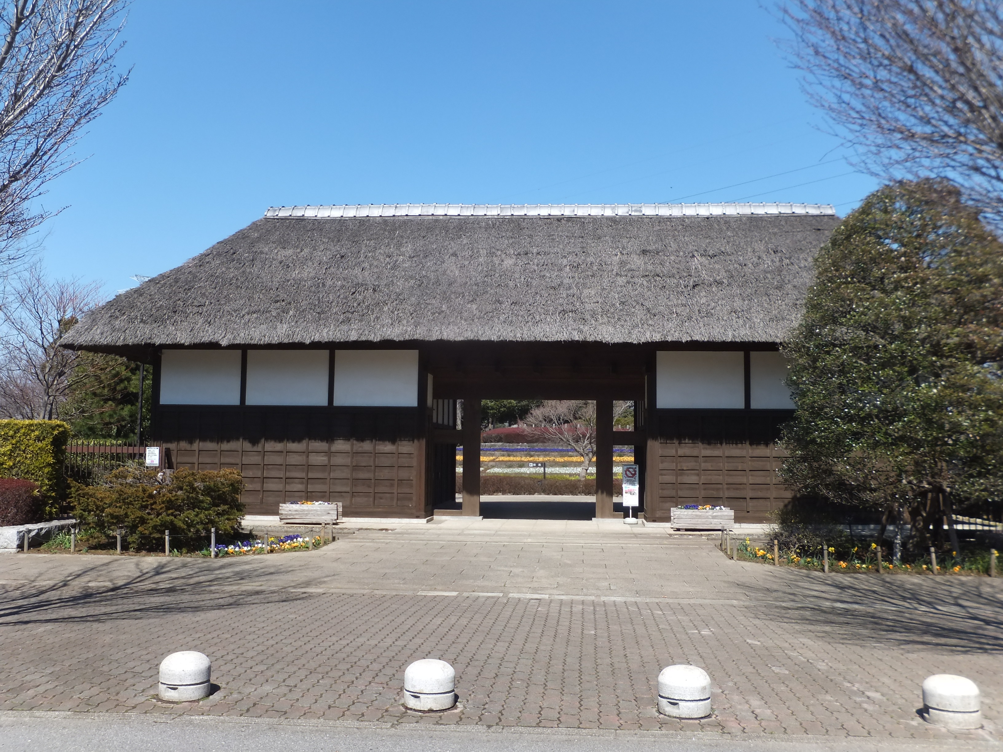 犢橋（こてはし）公園、ふるさと農園入口（千葉市花見川区）